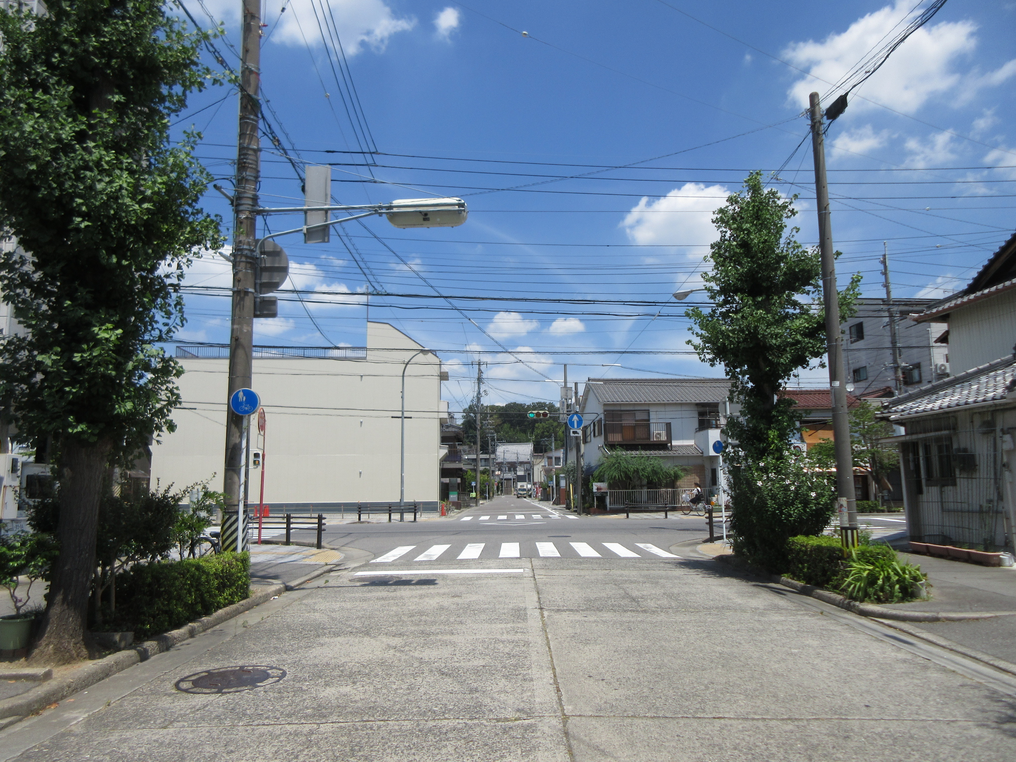 蓬莱町一丁目交差点（岡崎市蓬莱町）